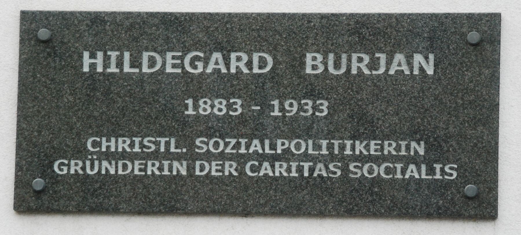 Gedenktafel für Hildegard Burjan am Hildegard-Burjan-Hof in Wien-Hietzing